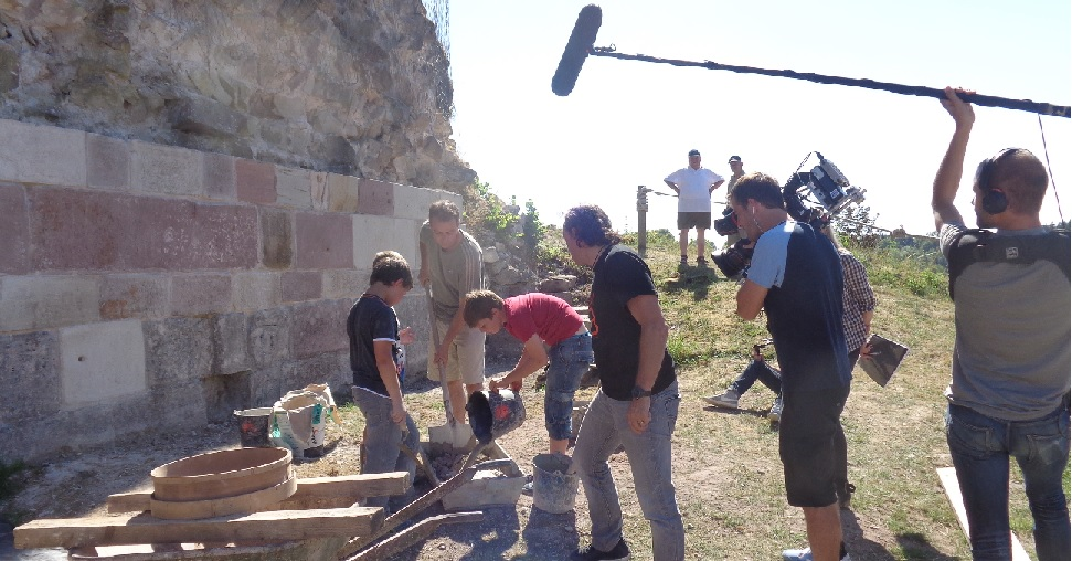 tournage émission de Fr2 chateau de Fontenoy-le-Chateau juillet 2015, Philippe Candeloro et AVF